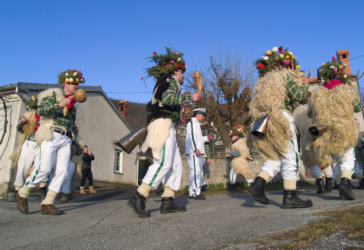 Zvončari iz lipe